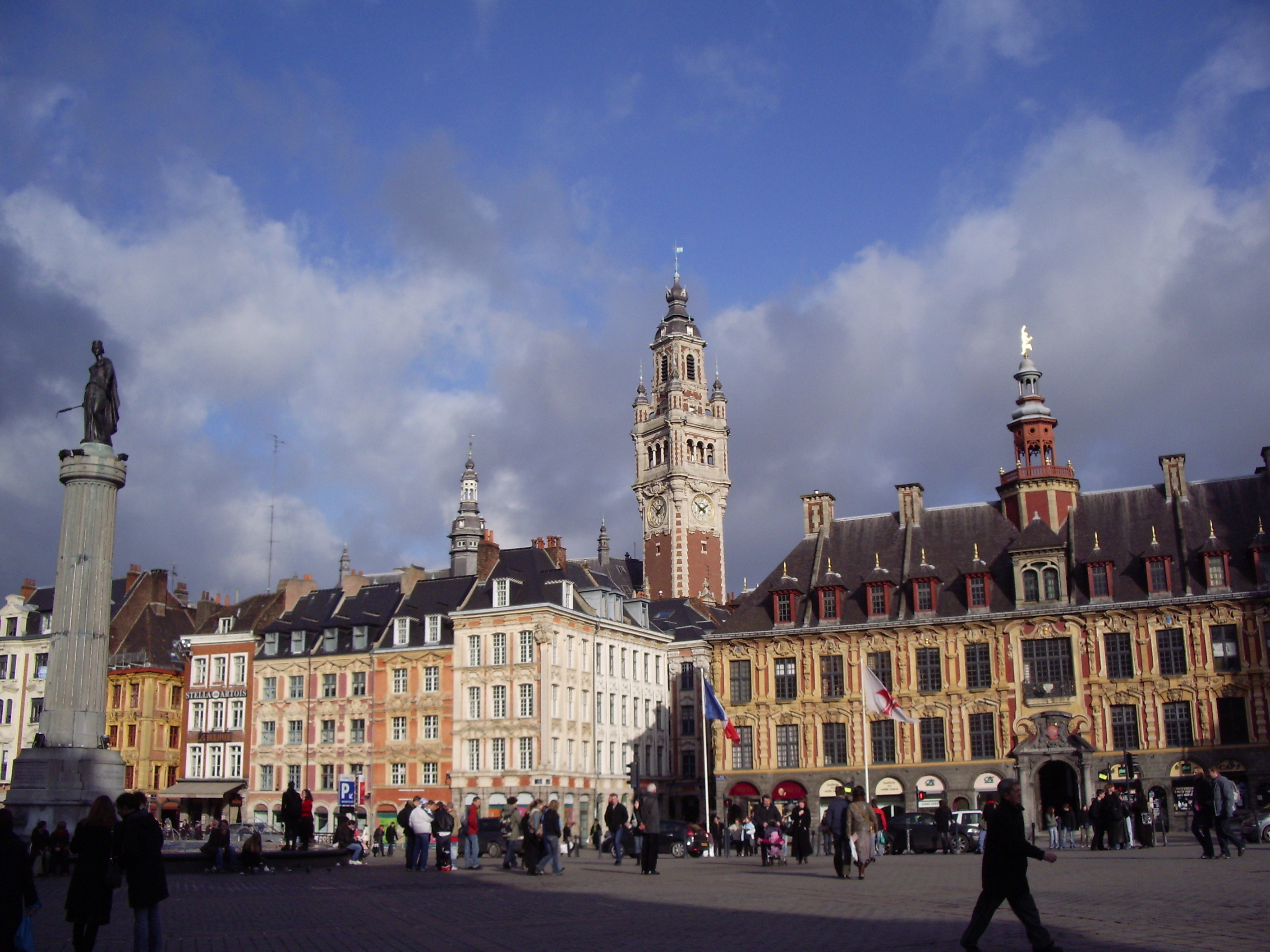 Lille, France : Place Général de Gaulle, also known as Grand'Place